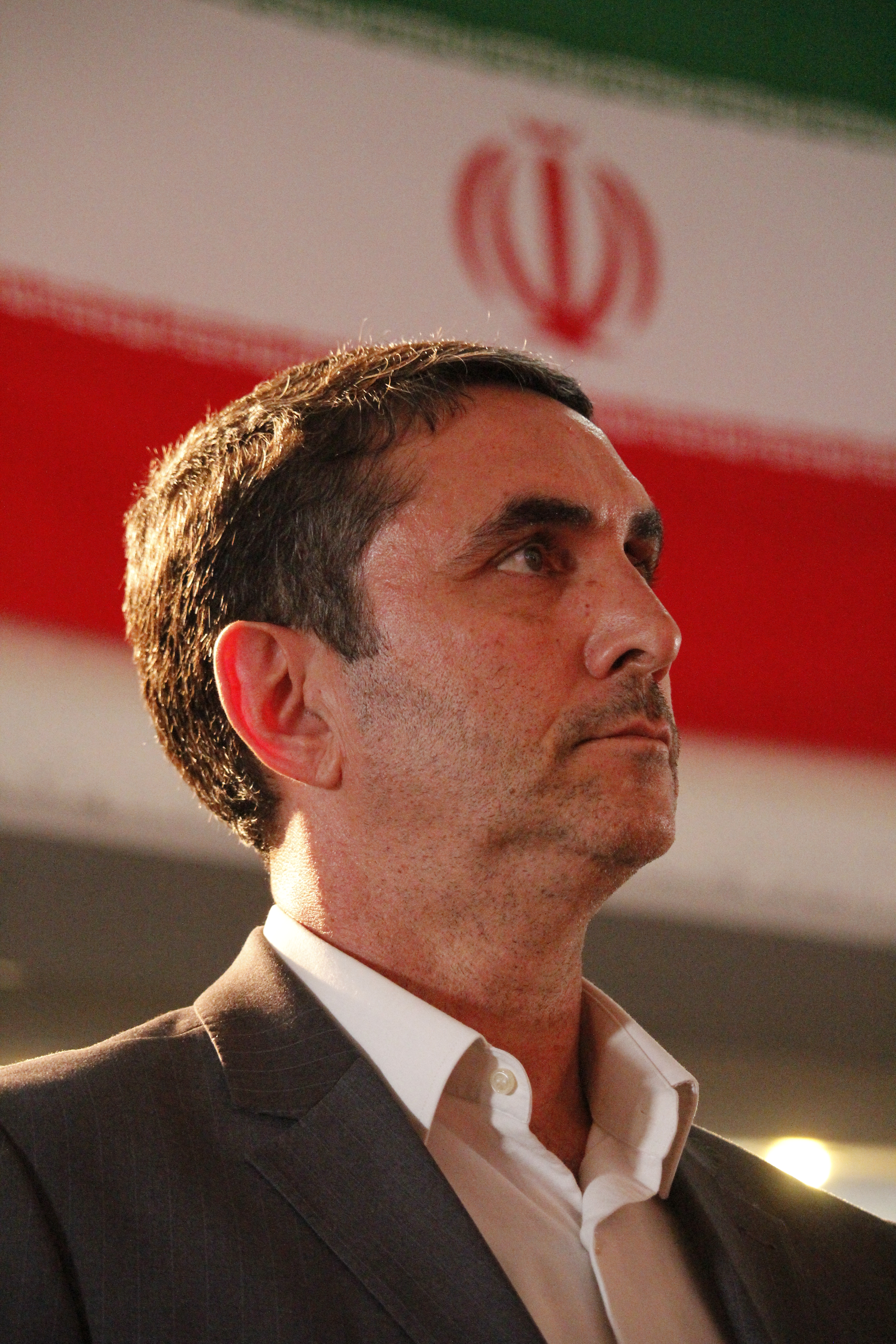 استاندار مرکزی - تفرش-هفته دولت۹۷